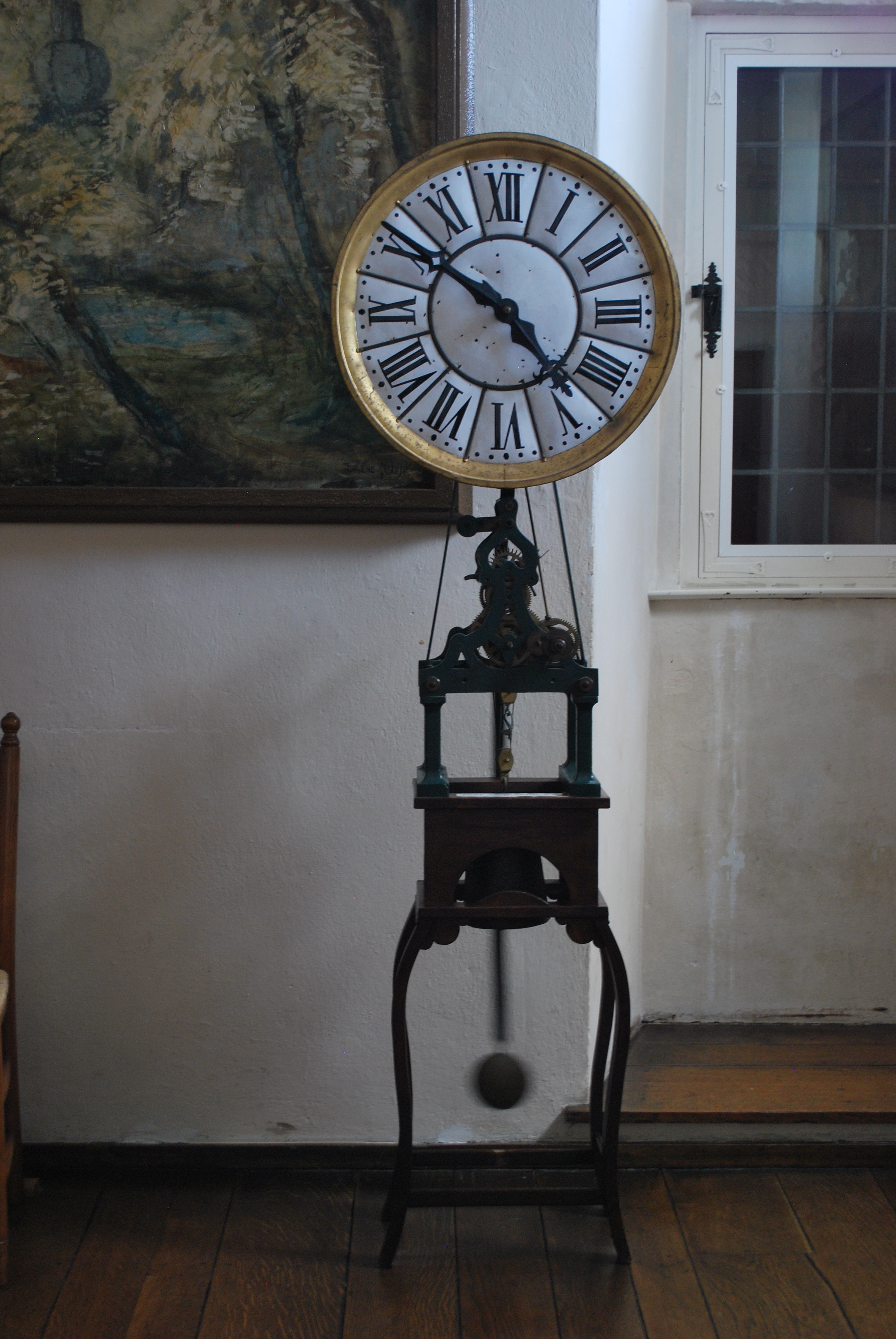 Schloss Hoensbroek, Uhr in dem Raum im ersten Stock des Südostflügels über dem Großen Saal